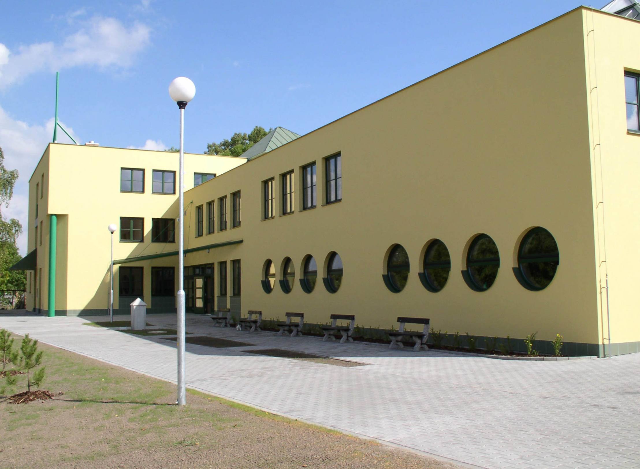 Pohled na Dům Matky Terezy